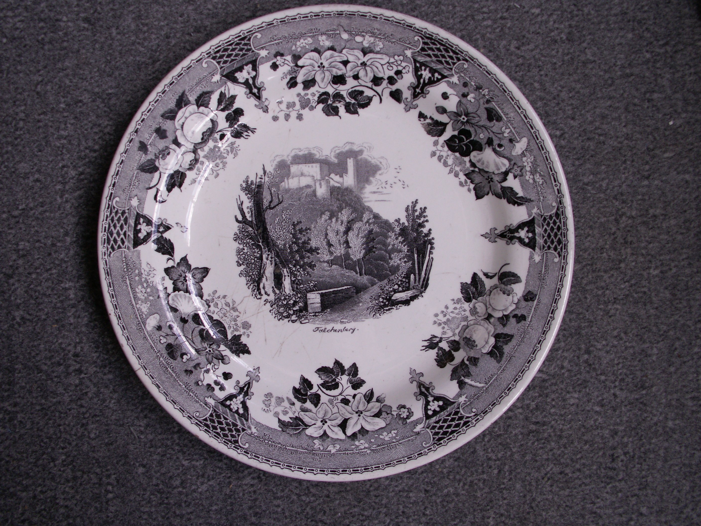 Teller